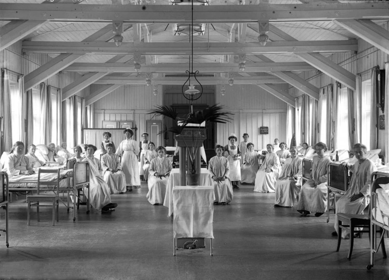 Das Innere der Baracke 8 des Krankenhauses St. Jakob Leipzig